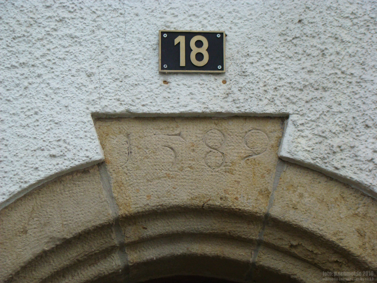 Datierung des Alten Pfarrhauses in Bad Rappenau-Fürfeld